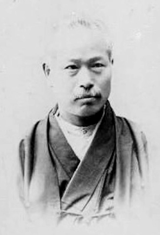 Portrait of Okamoto Kansuke (1836-1904), Japanese explorer